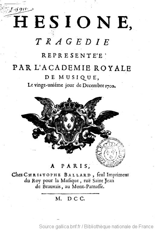 Hésione, opéra tragique par André Campra et d'un livret de Antoine Danchet; première page du livret